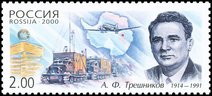 Timbre russe en l'honneur d'Aleksei Treshnikov